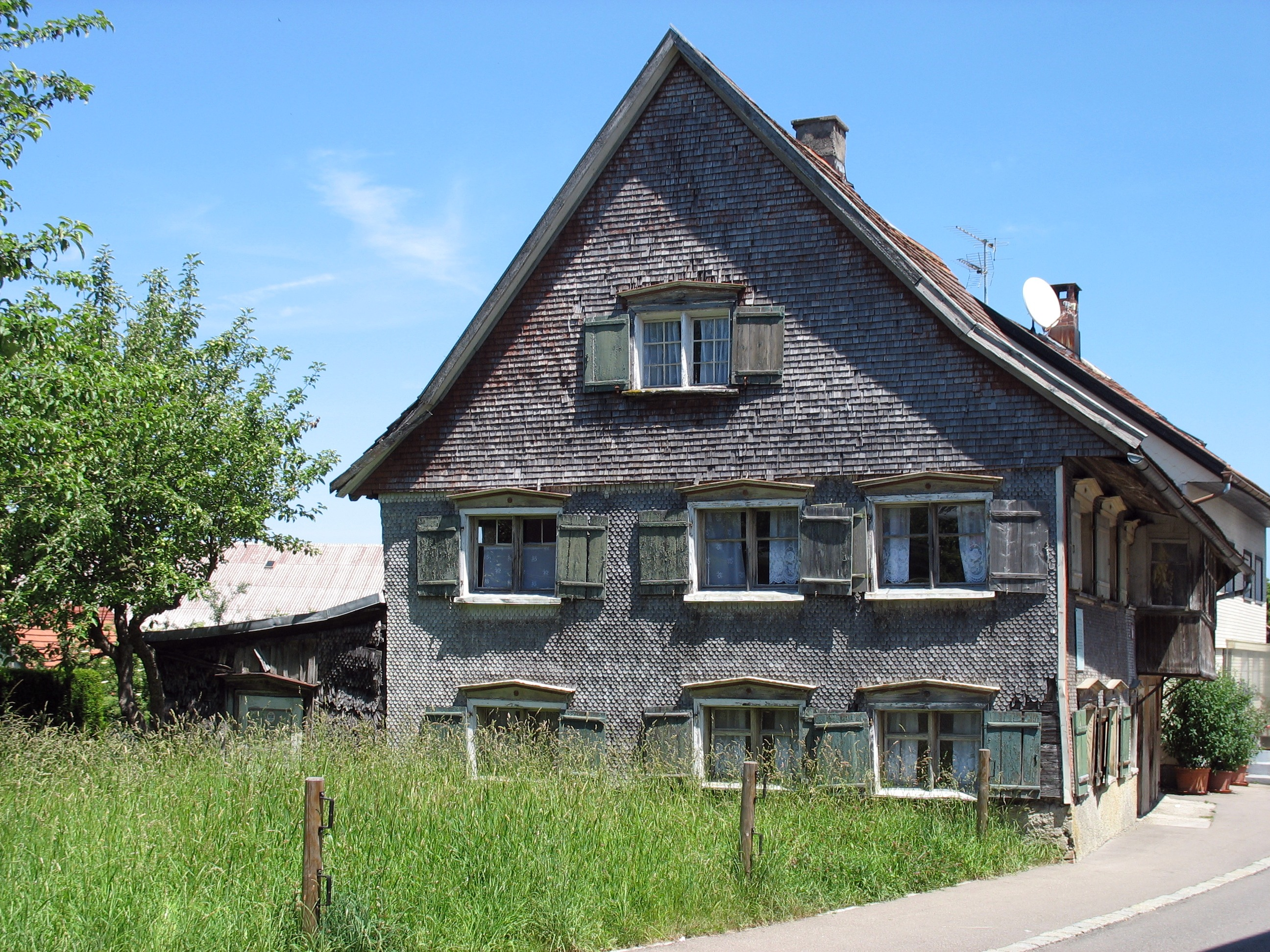 Das älteste Haus von Lindenberg im Allgäu, erbaut im Jahr 1590. War noch bis ca 1992 bewohnt. Hansenweiher Str. 6. Das Haus befindet sich derzeit im Eigentum der Stadt Lindenberg und soll irgendwann einmal zu einem Museum umgebaut werden.